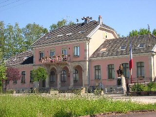 Village de Foussemagne (Territoire de Belfort), la mairie Photo prise en mai 2004 par LP90 Licence GFDL LP90 mai 2004